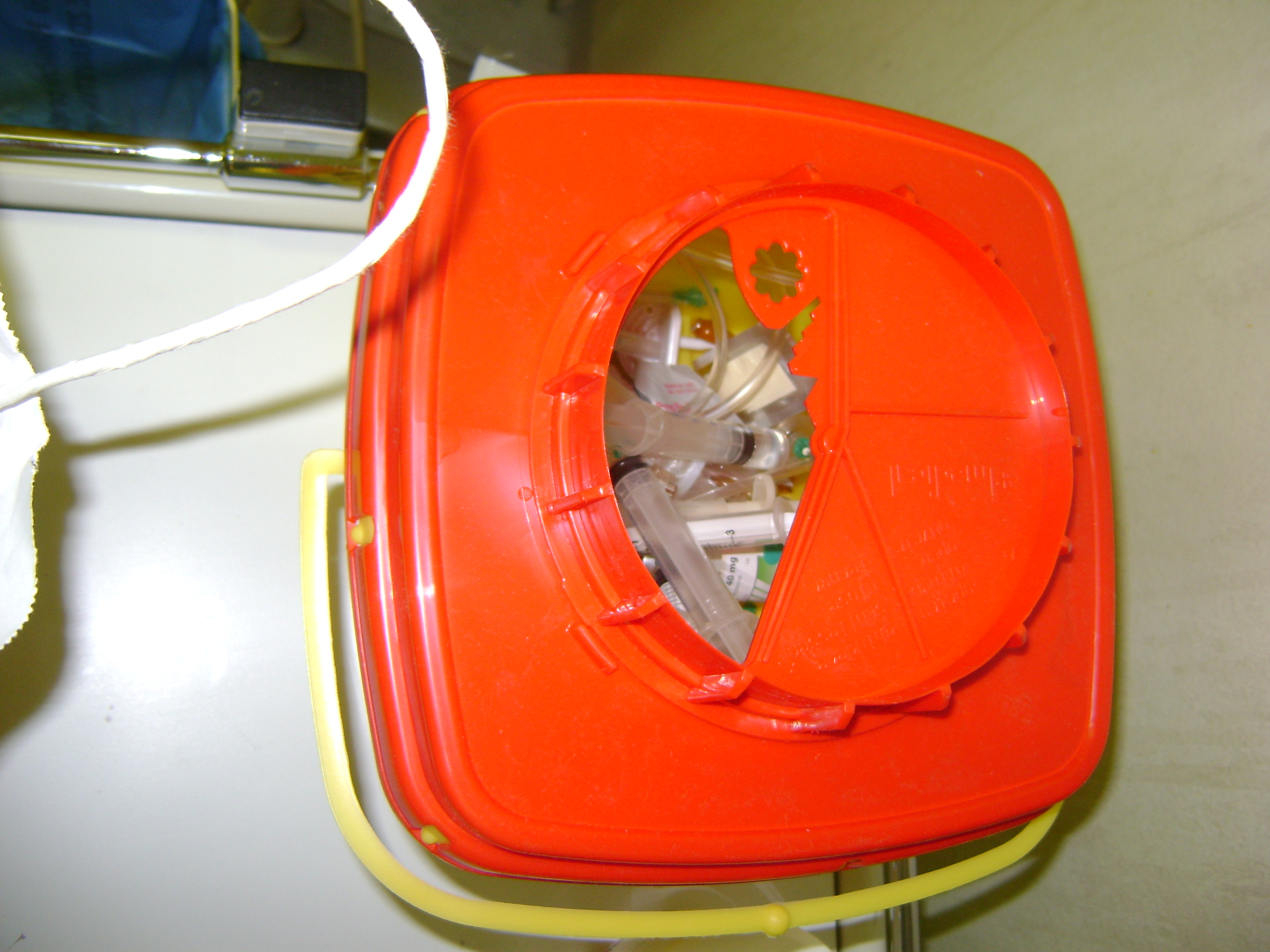 Sharp kontejner